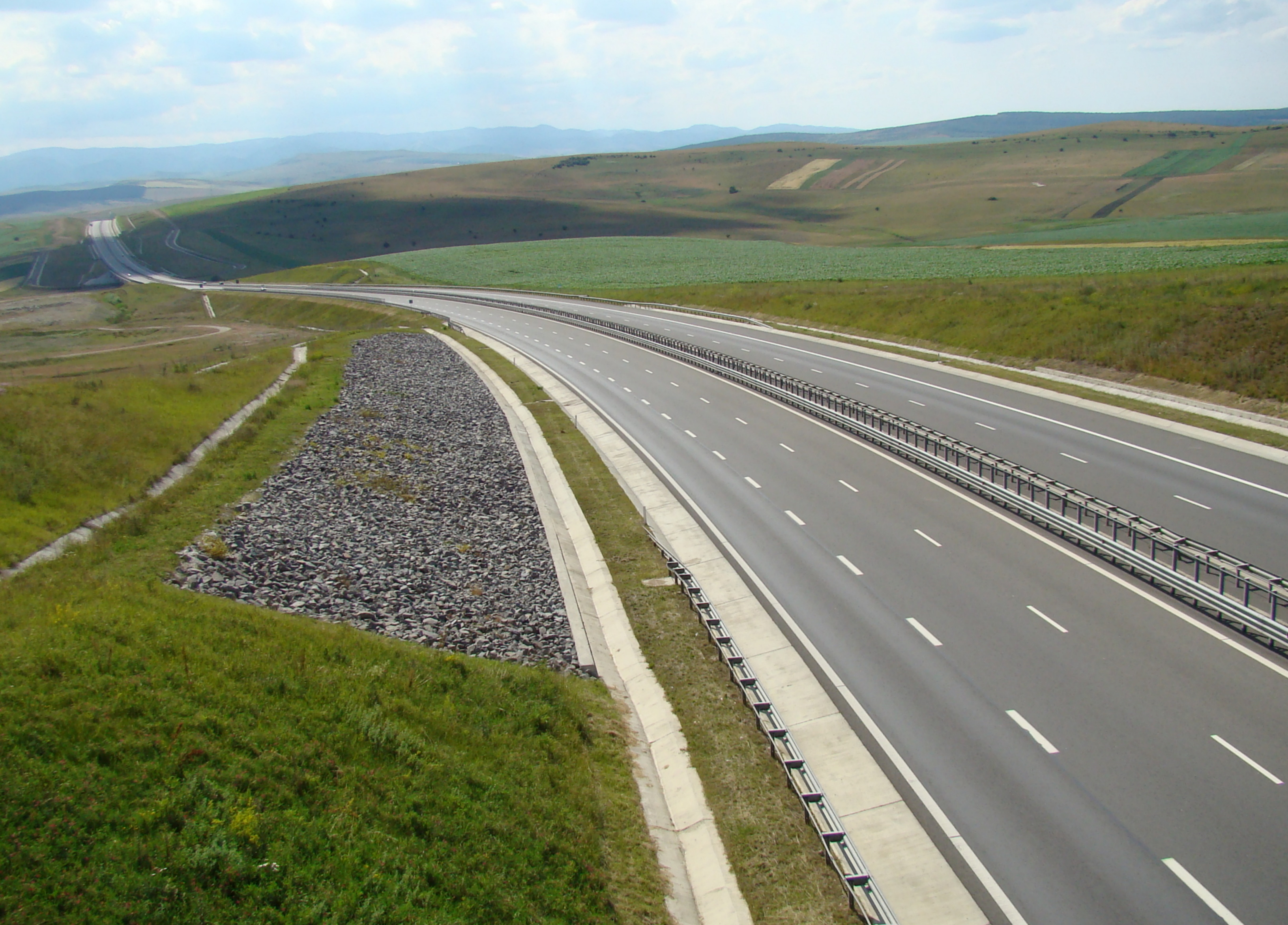 Autostrada Transilvania în apropiere de Turda